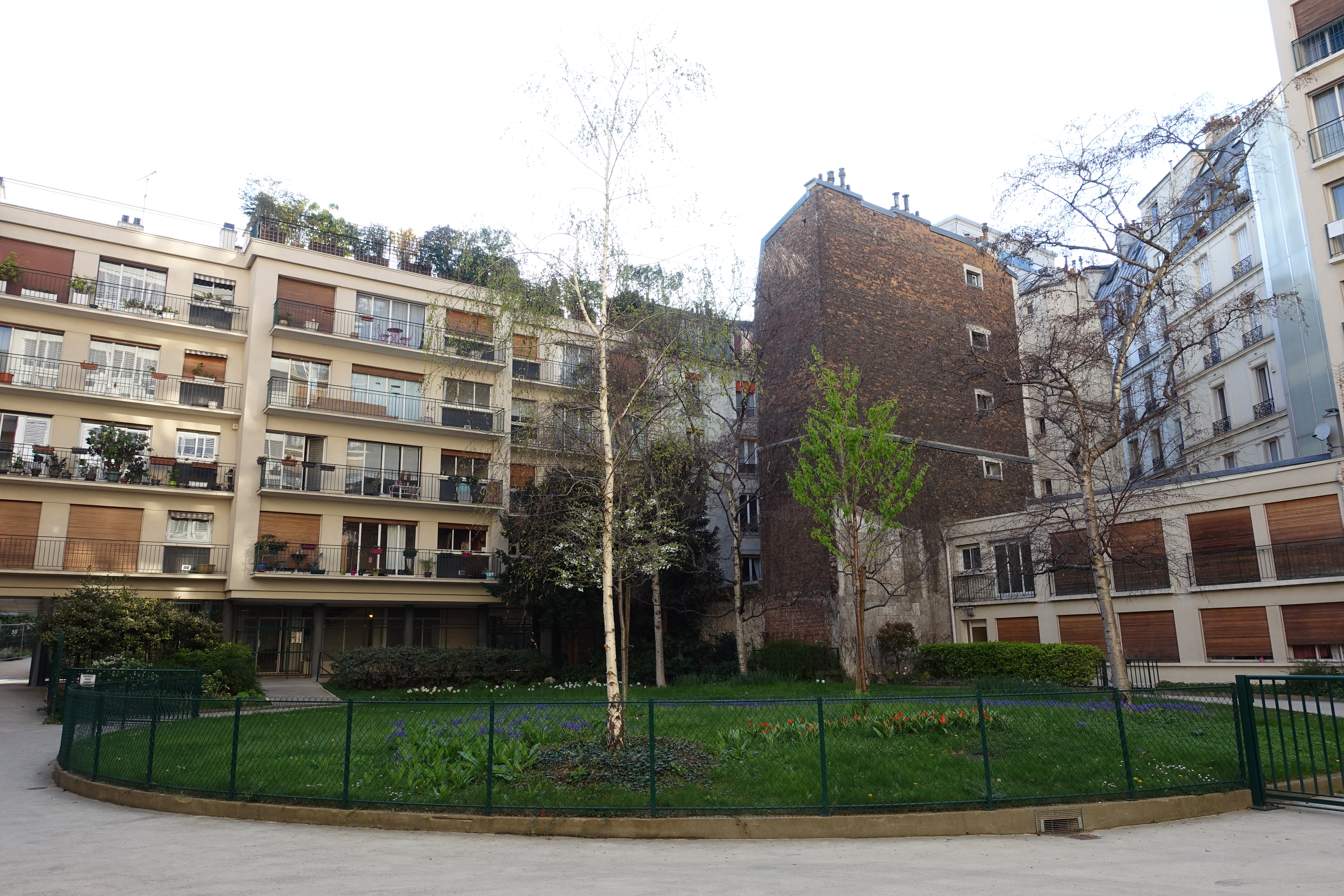 Square Alexis Clérel de Tocqueville @ Paris